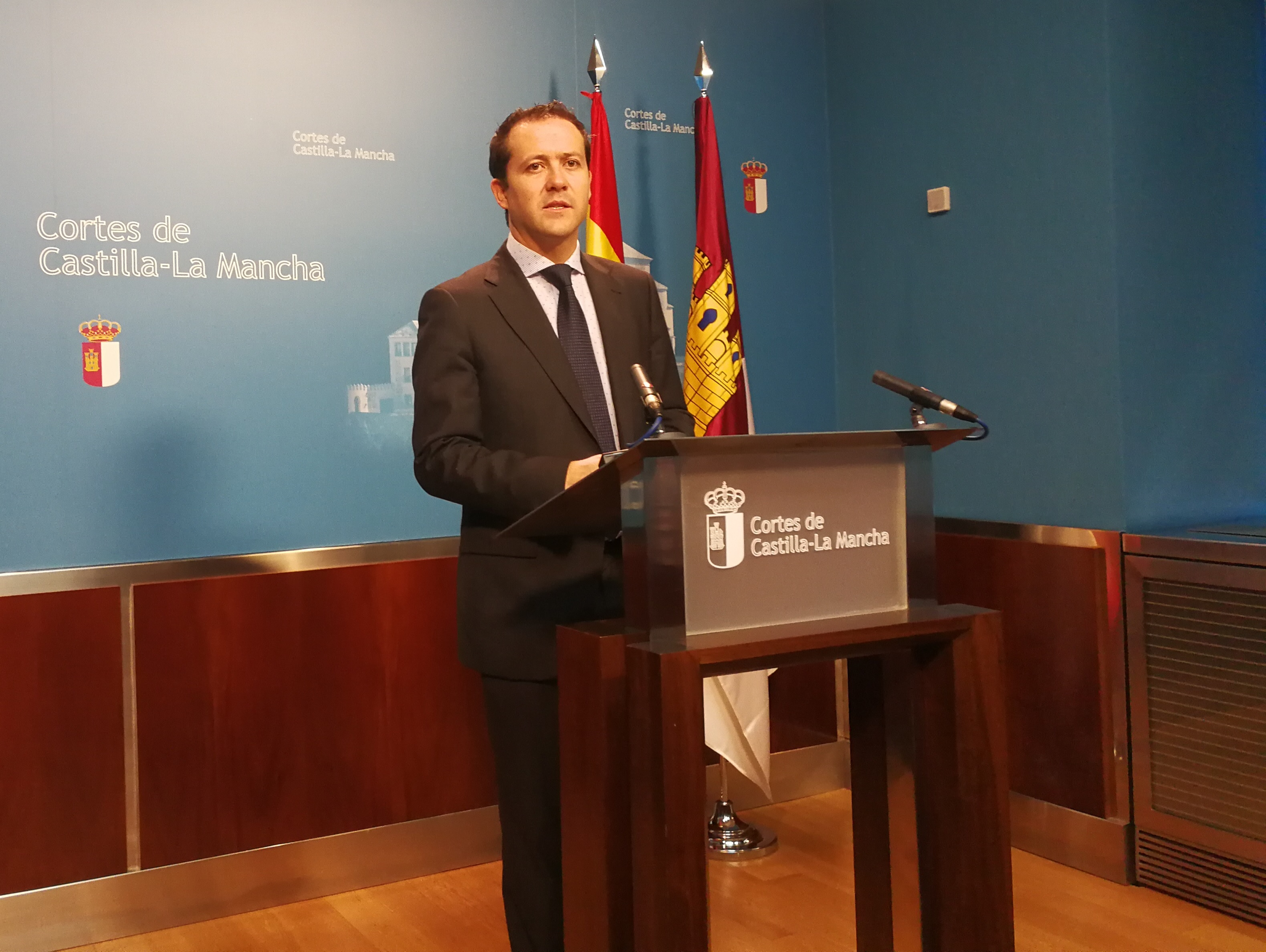 Carlos Velázquez en una comparecencia en las Cortes de Castilla-La Mancha